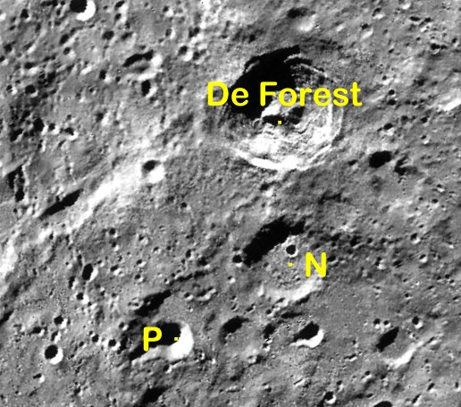 Cráter lunar De Forest. Cráteres satélite. (Imagen LRO)